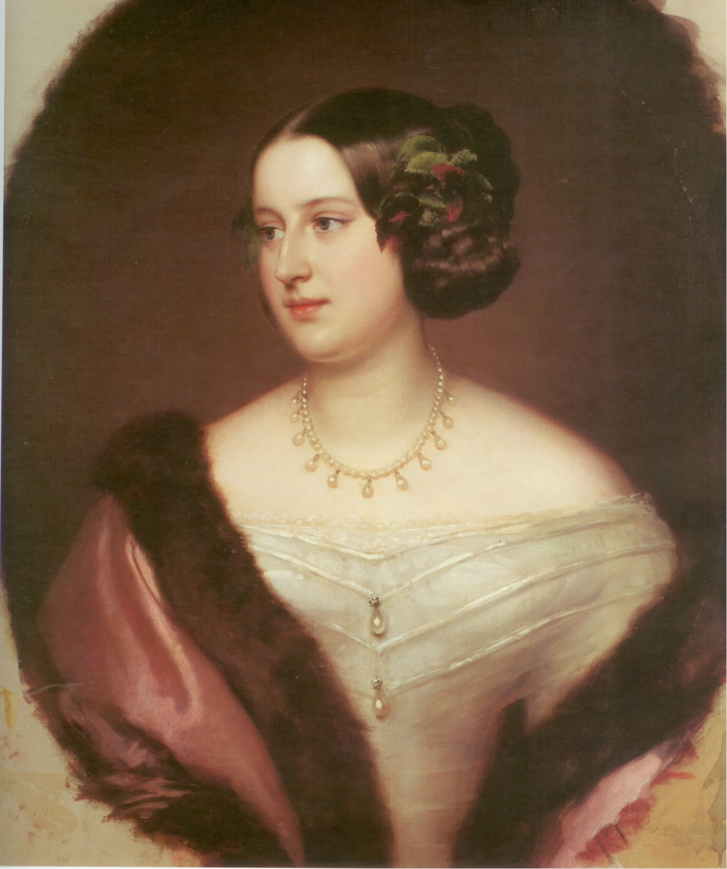 Elisabeth Alexandrine de Ficquelmont, princess Edmond von Clary-und-Aldringenlabel QS:Len,"Elisabeth Alexandrine de Ficquelmont, princess Edmond von Clary-und-Aldringen" label QS:Lfr,"Elisabeth Alexandrine de Ficquelmont, princesse Edmond von Clary-und-Aldringen" label QS:Lru,"Елизавета Александра Клари-и-Альдринген"